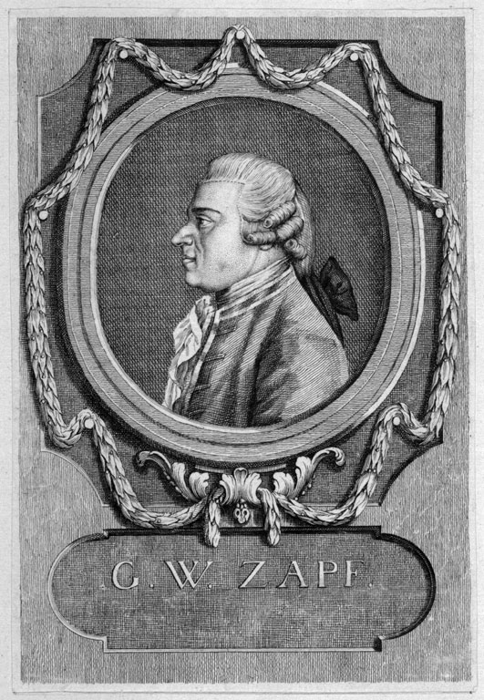 Georg Wilhelm Zapf in mittlerem Alter